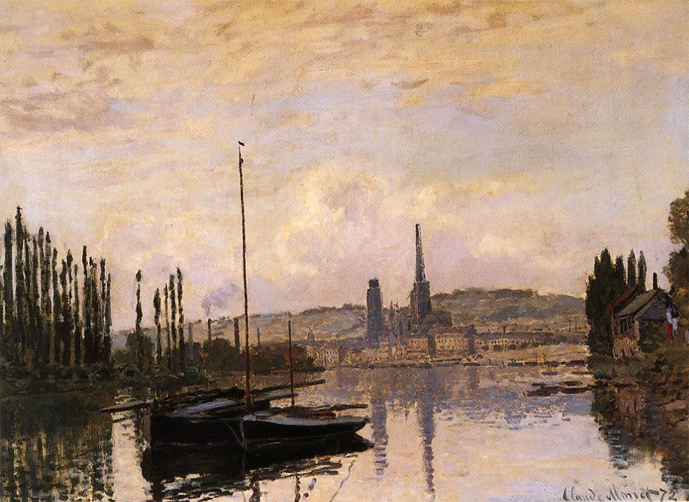 Claude Monet, Vue de Rouen 1872, collection privée